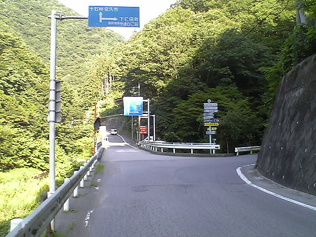 群馬県道45号下仁田上野線・起点